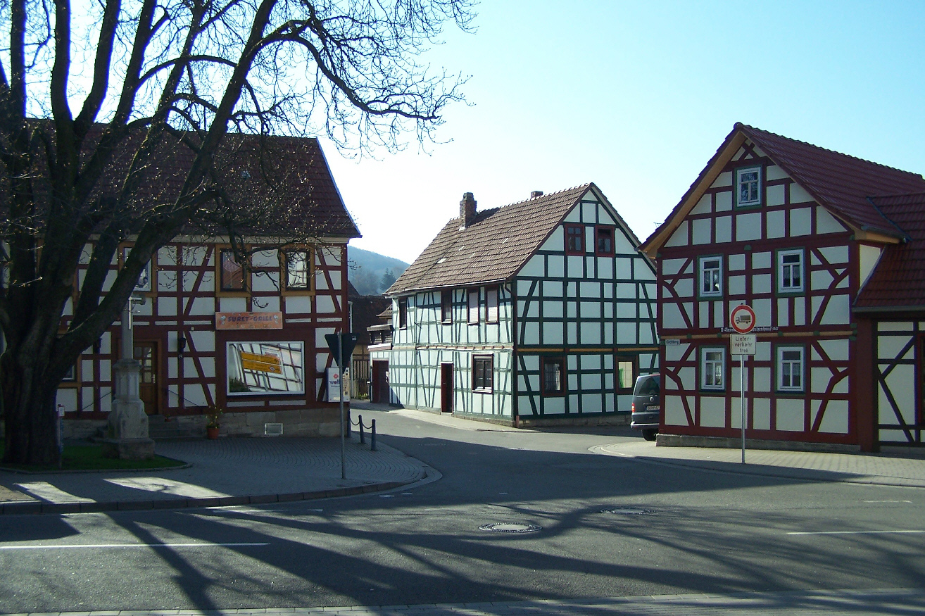 In der Ortslage Heyerode.